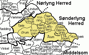 old Viborg Amt, Denmark Source: 'Map by Svend-Erik Christiansen